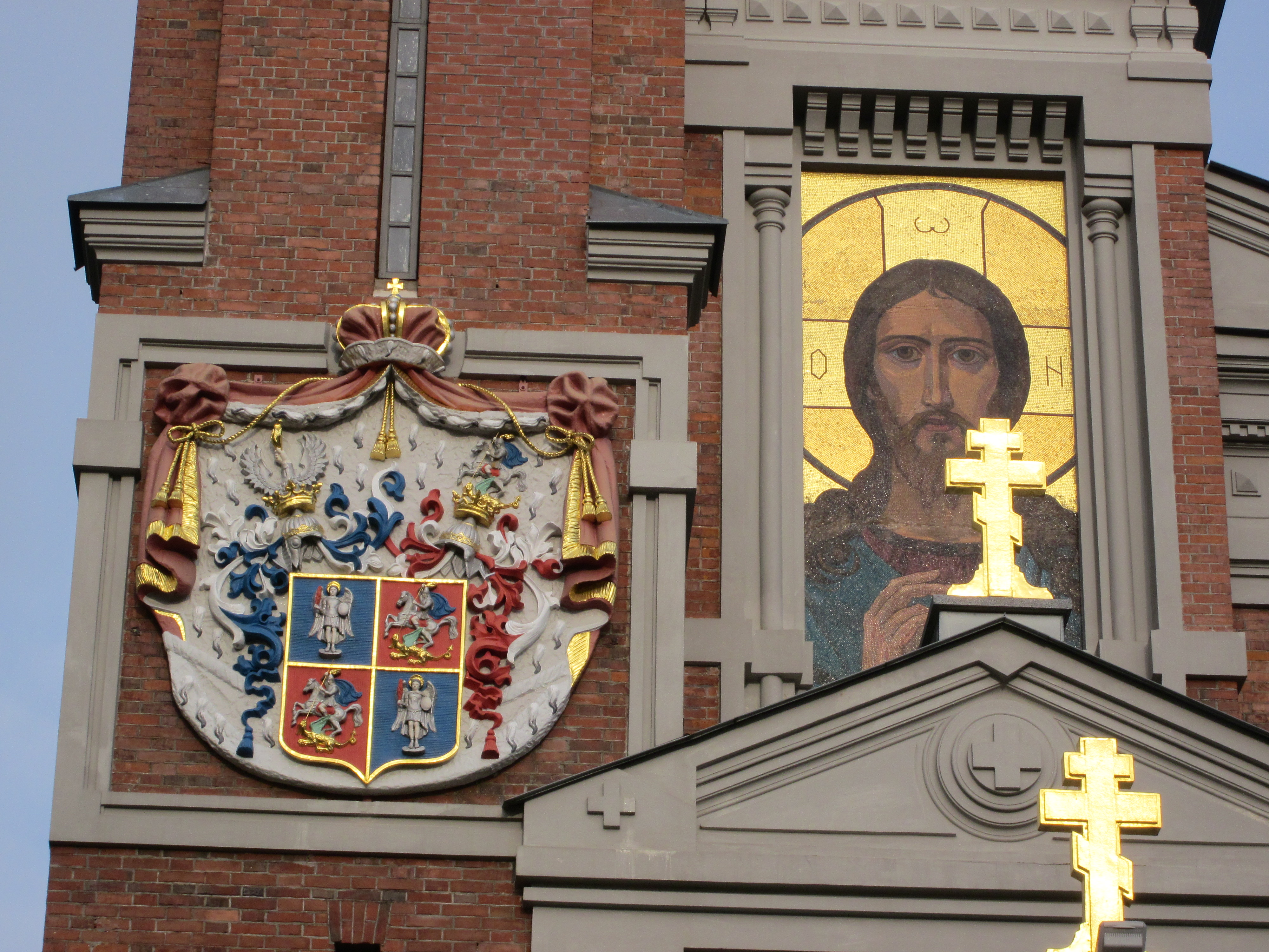 Беларуская (тарашкевіца): Мазаічная выява на фасадзе капліцы-пахавальні замкавага комплексу «Мір». г.п. Мір This is a photo of Belarusian heritage monument. Reference number: 412Г000318 ( WLM)